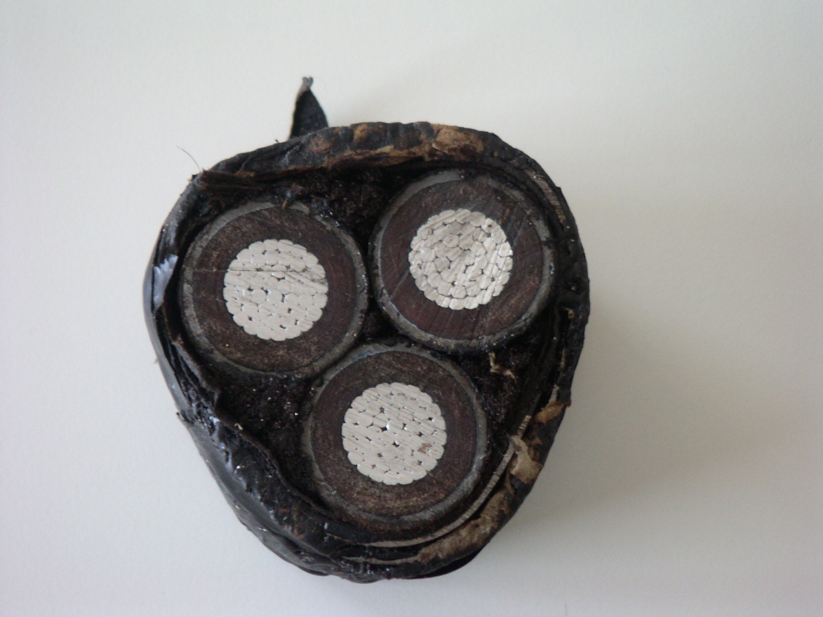 Dreimantel-Kabel für 30 kV (Aluminiumleiter)